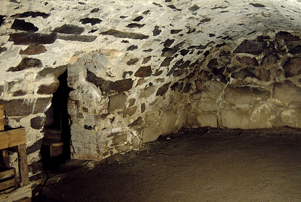 Hirvilahden kartanon kellarikerroksen iso kellarihuone